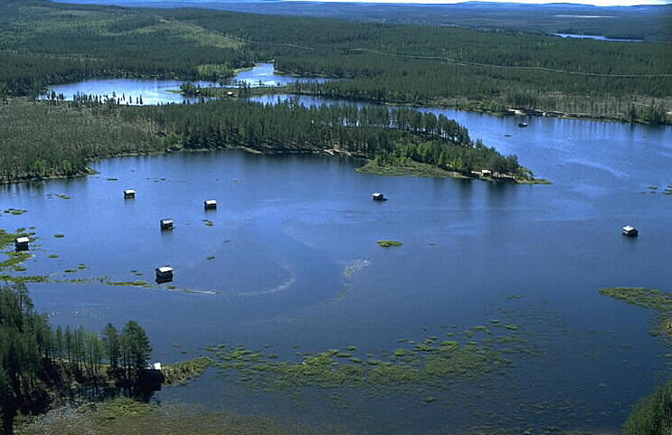 Motiv: Svansele dammängar Nyckelord: Flygbilder, Naturreservat, Riksintressen Kategori: Skogslandskap Svansele dammängar